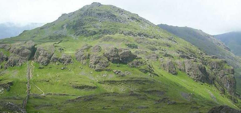 Moel yr Ogof from Moel Hebog